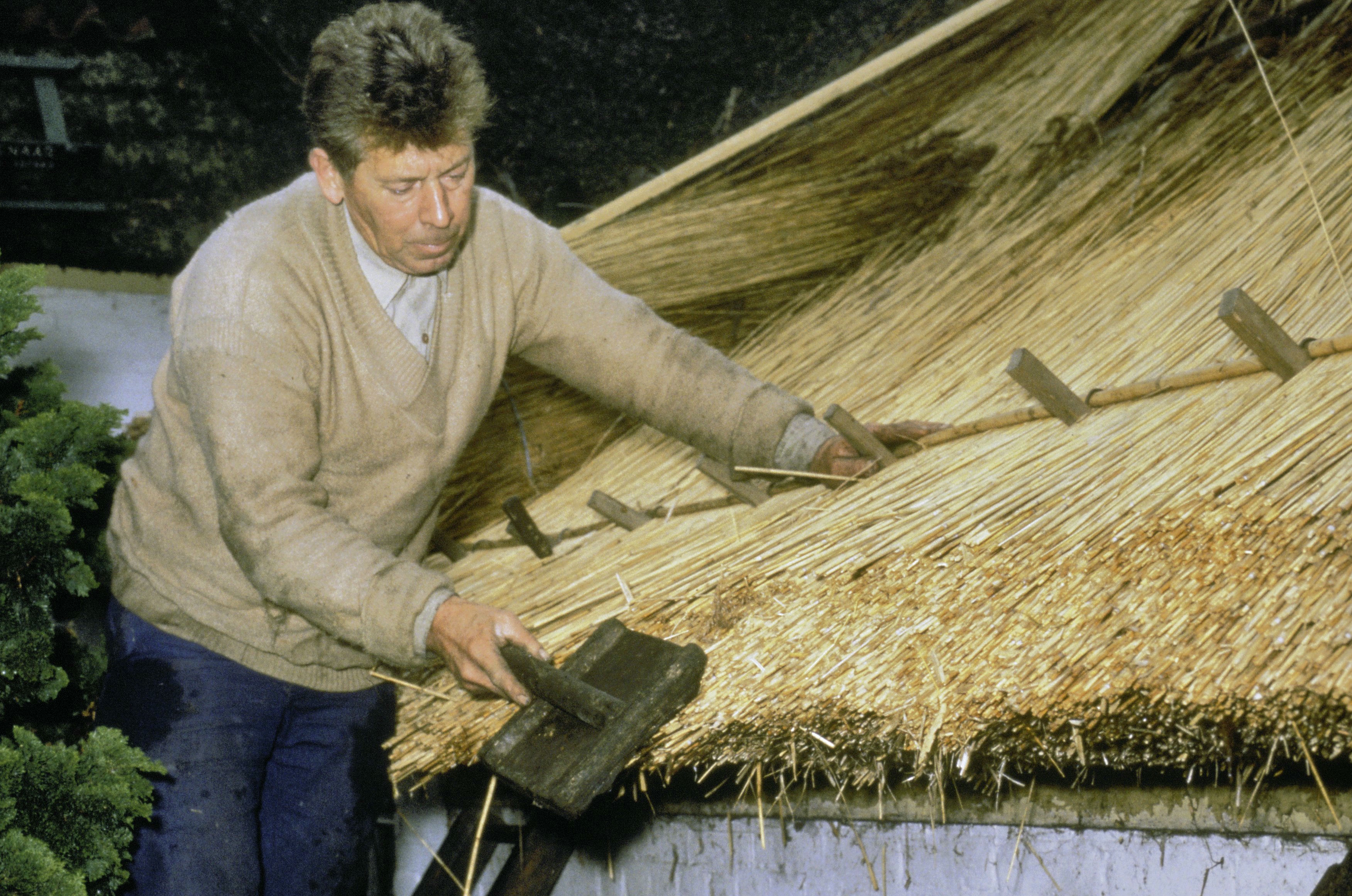 Riet/ Rietdekker: Riet binden: het riet wordt met de drijfbord (opmerking: Diaklankbeeld "Het Rieten Dak" (nr.: B 30))